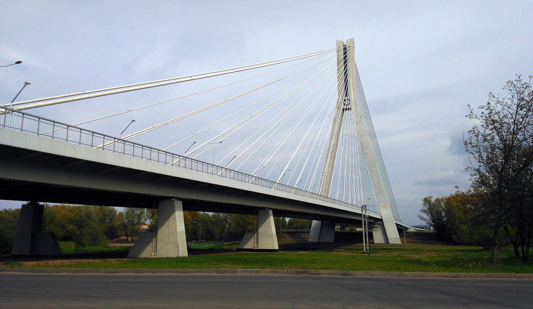 Widok z boku